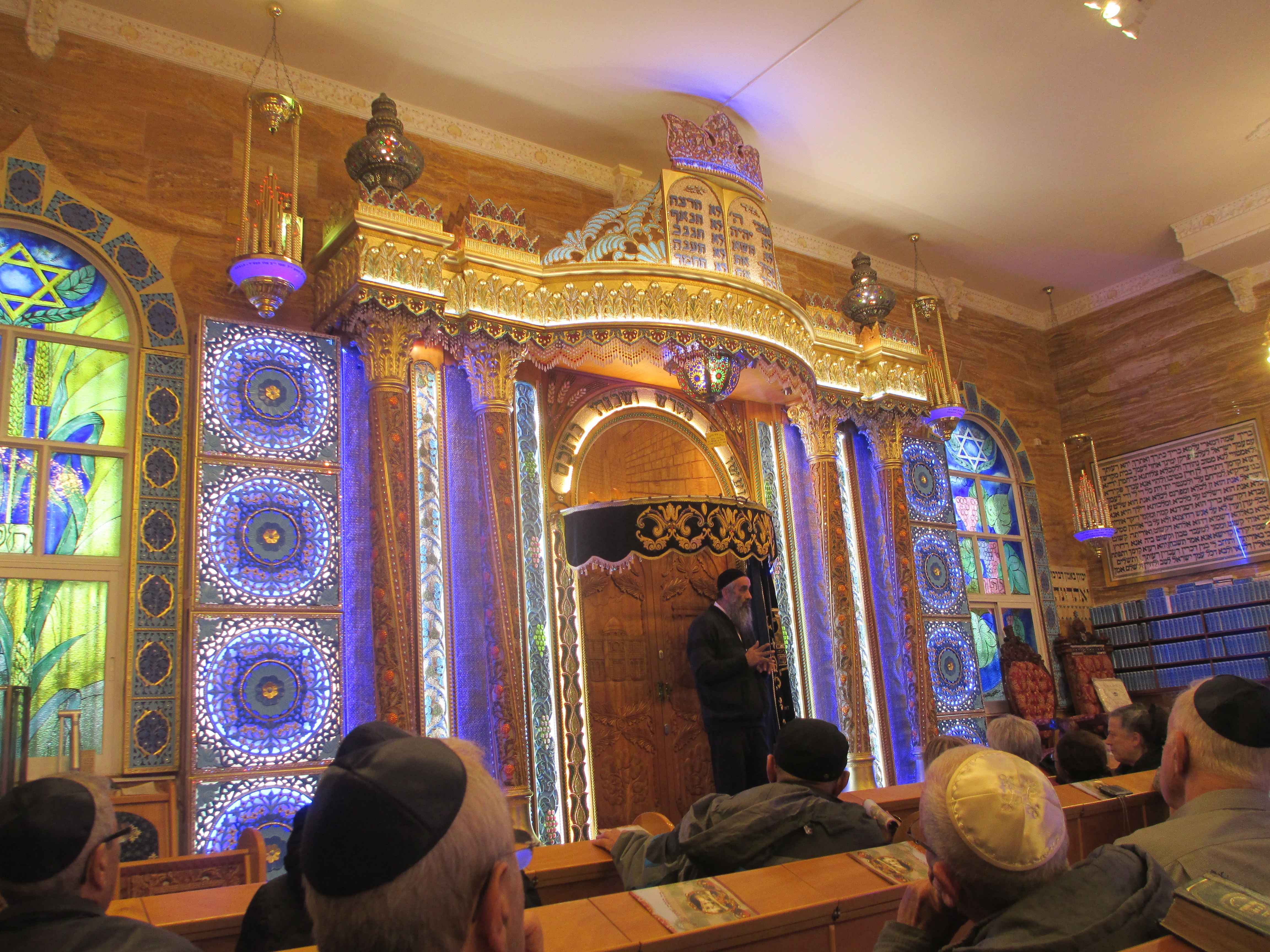 בית הכנסת הקווקזי בטירת כרמל